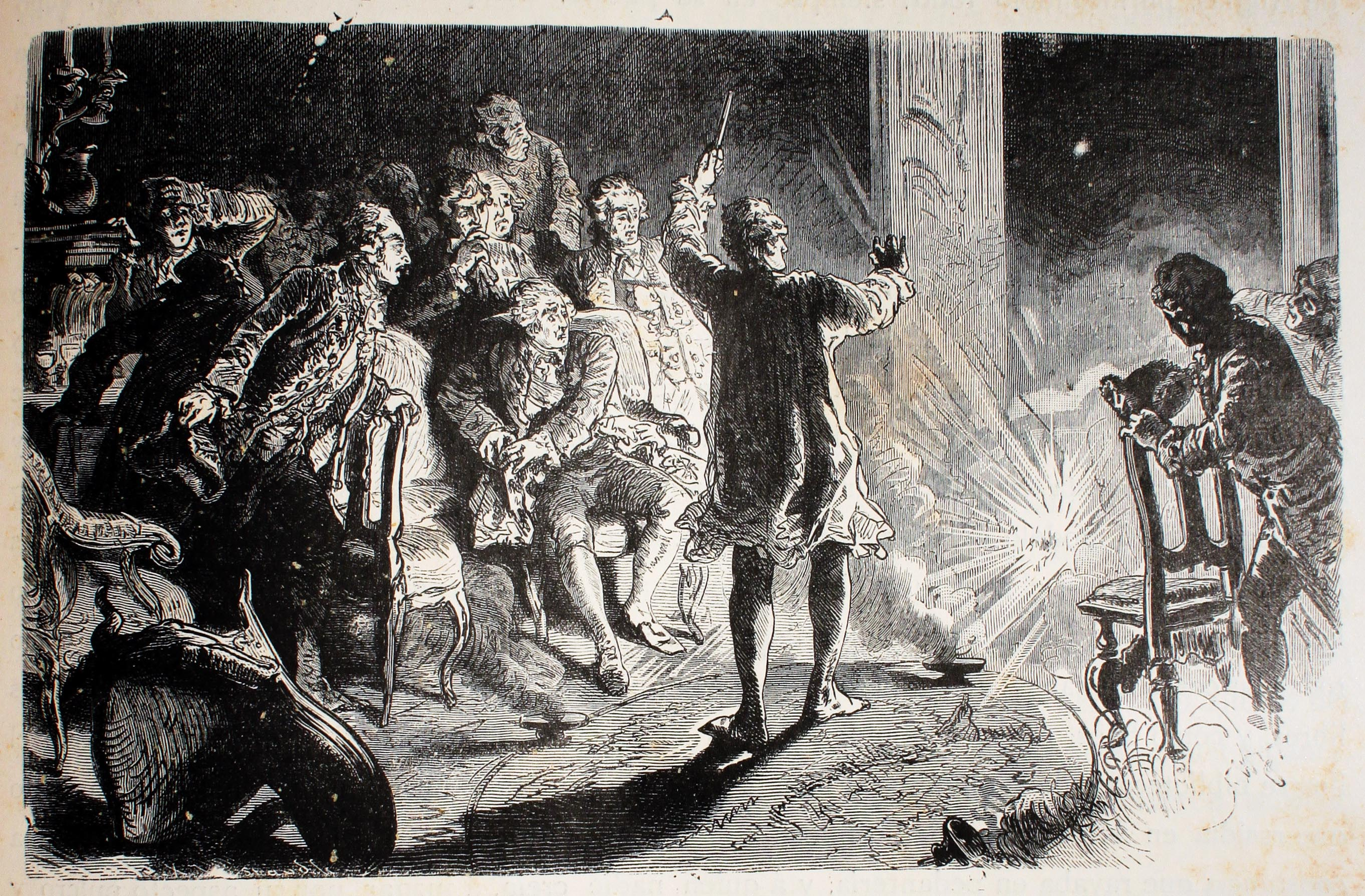 "Evocación de los espíritus en Dresde por Cagliostro". Ilustraciones de la obra : Germania : dos mil años de historia alemana / por Juan Scherr. - Barcelona : Montaner y Simón, 1882.